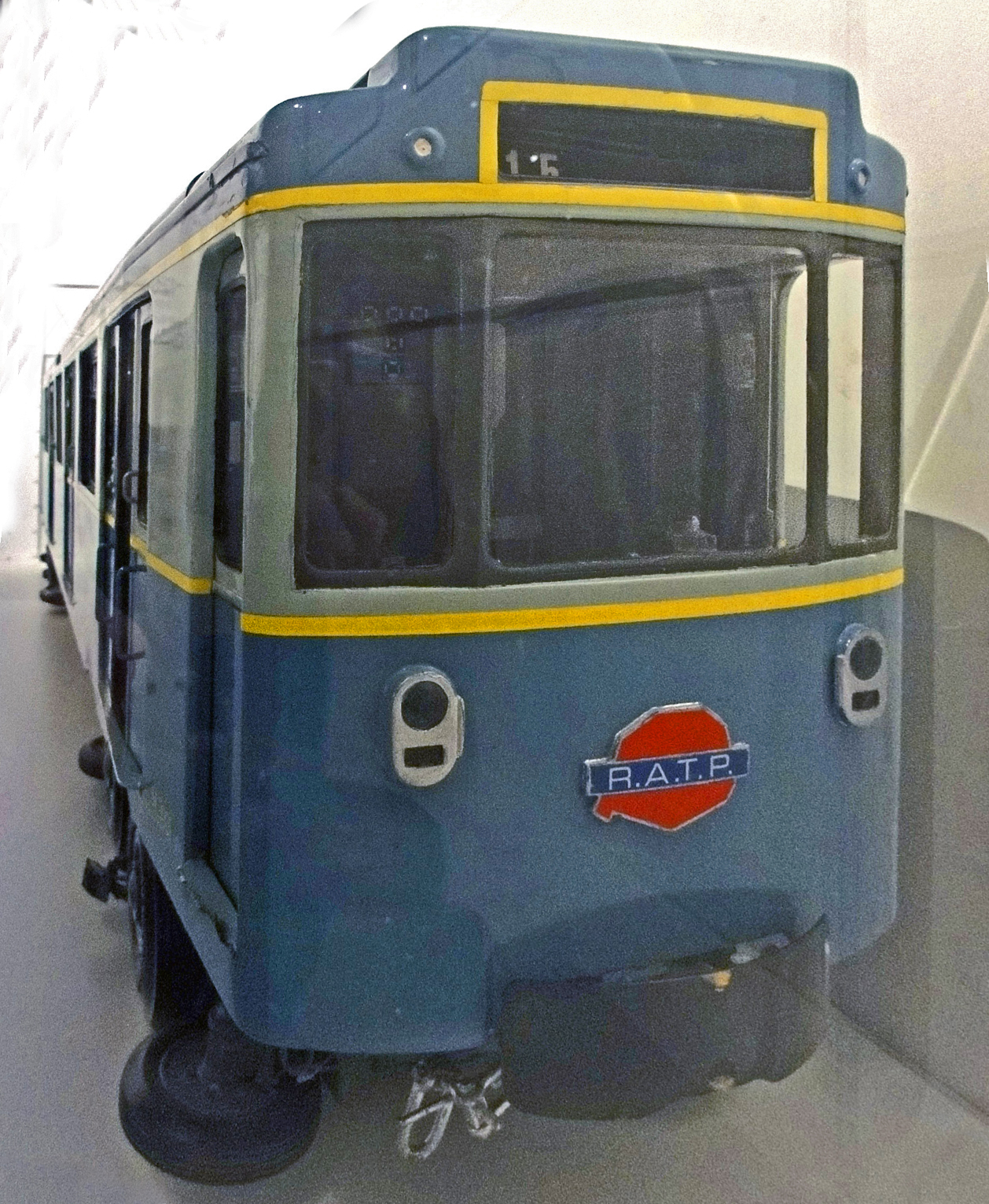 Maquette du MP 55 du métro de Paris, France.